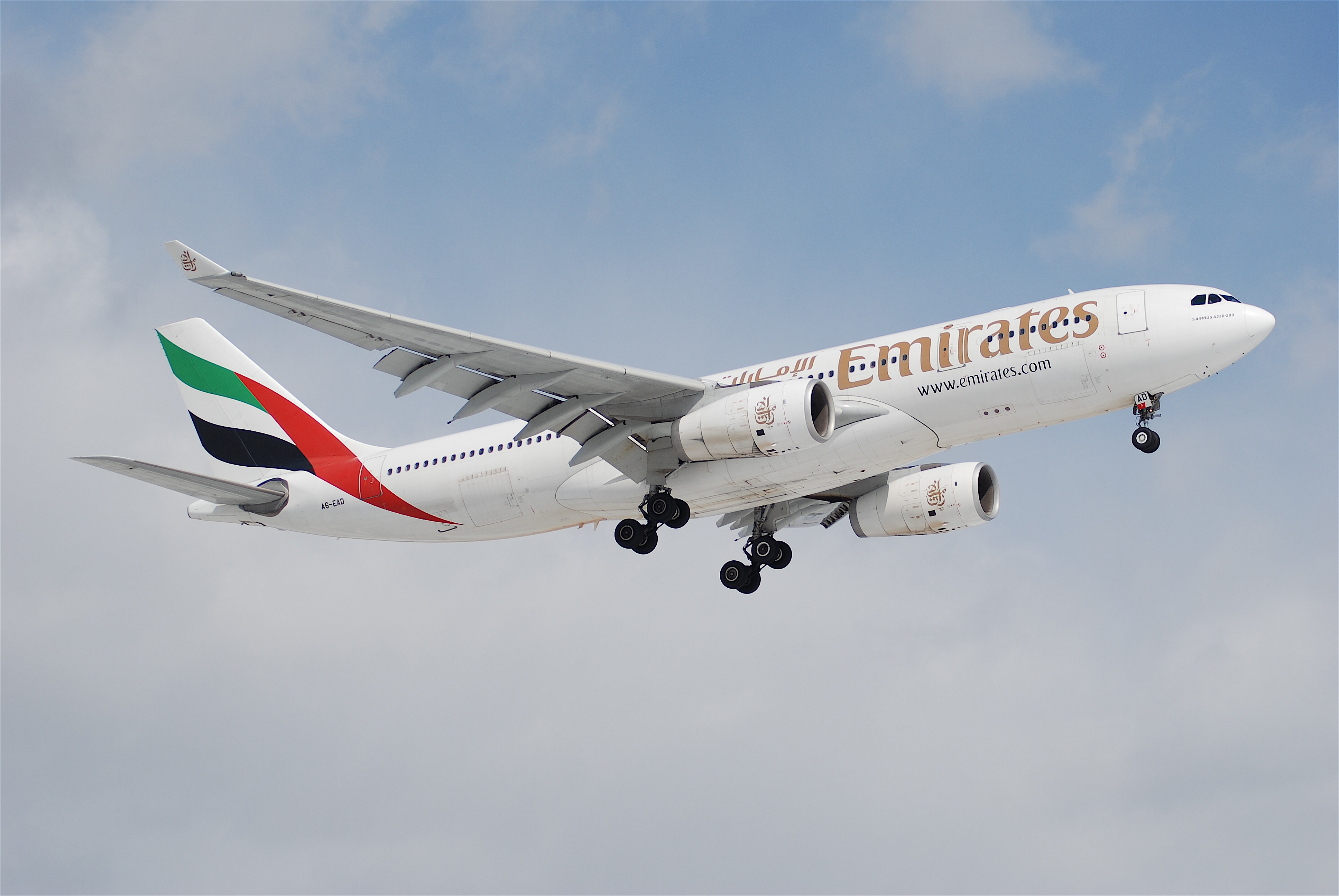 Emirates Airbus A330-200; A6-EAD@ZRH;25.03.2008/505ad